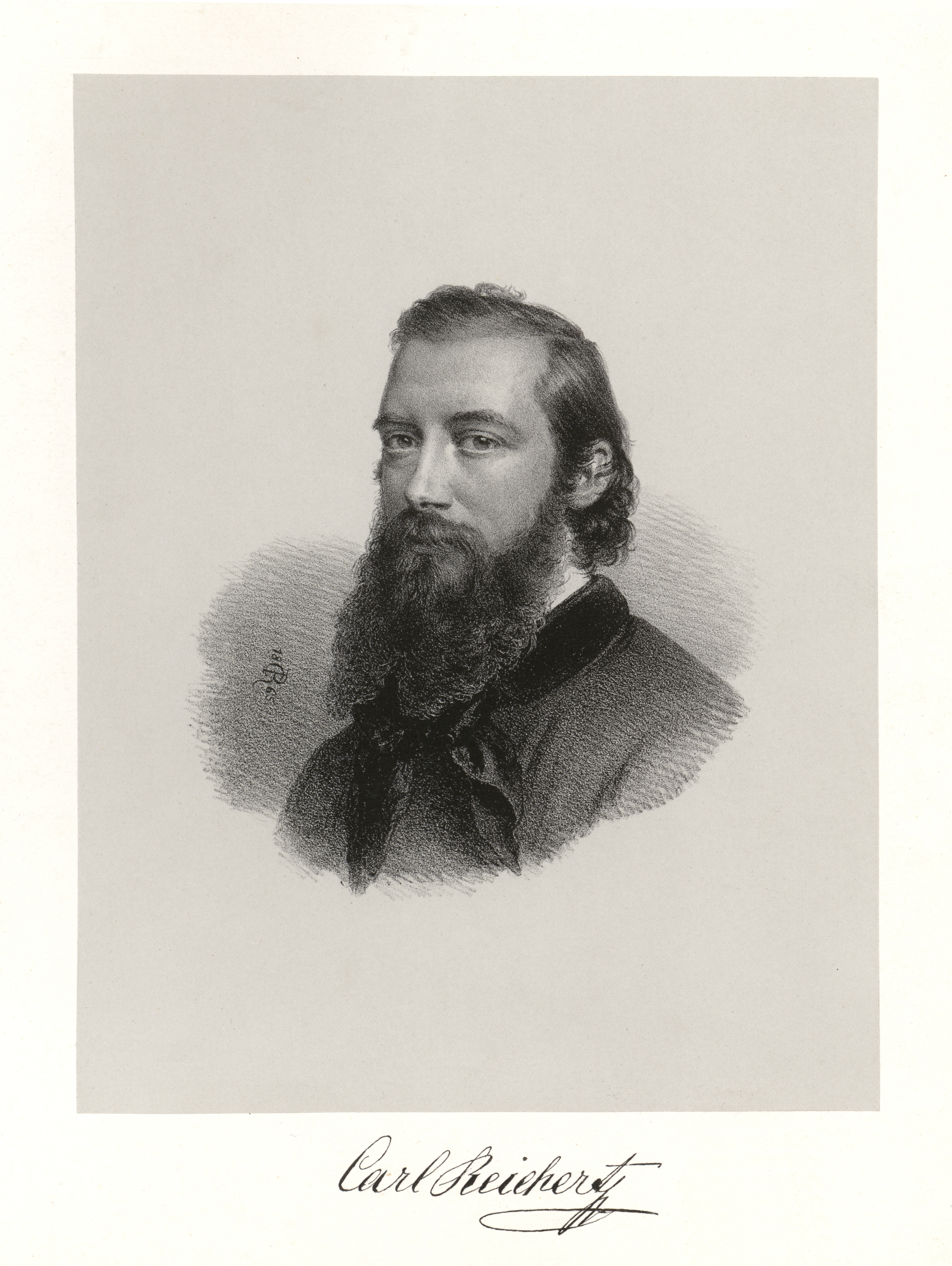 Carl Reichert, geb. 27. August 1836 in Wien, gest. 5. April 1918 in Graz (Steiermark). Landschafts-, Tiermaler, Verleger und Lithograf.